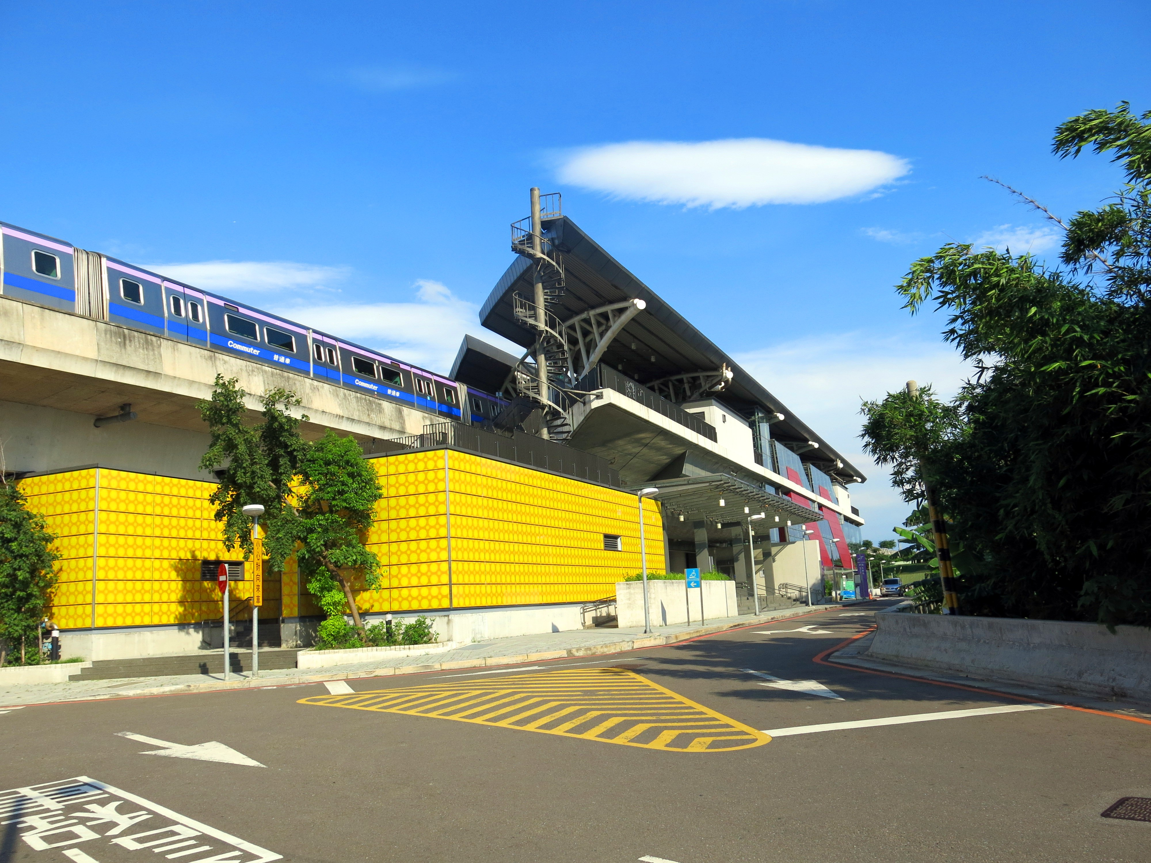 中文（台灣）: 桃園捷運機場線A15大園站